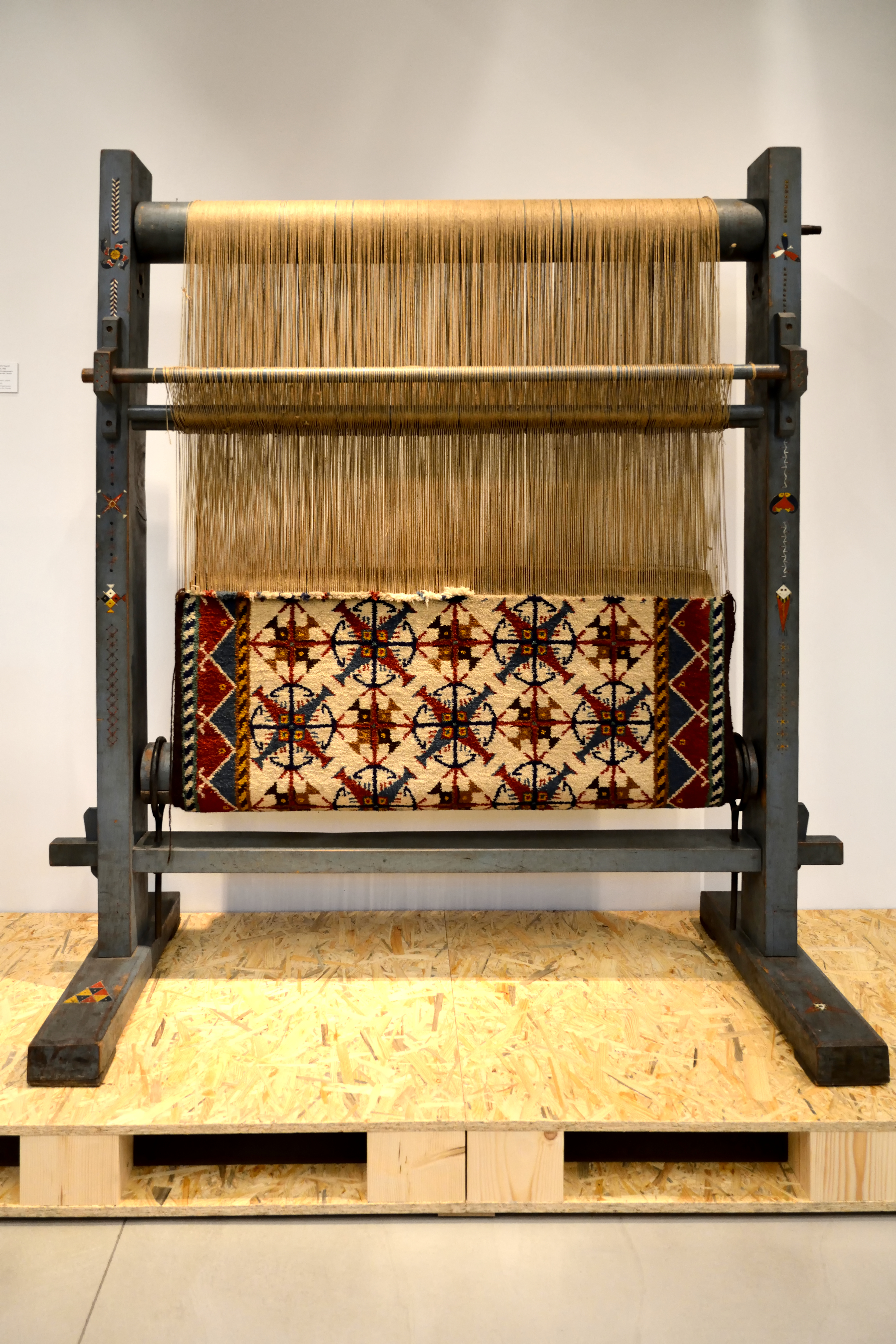 Impressionen aus dem Museum Europäischer Kulturen.Sonderausstellung 100 Prozent Wolle vom November 2017 bis Juni 2019.Knüpfstuhl mit FischerteppichFreest/Deutschland 1955Hersteller: Produktionsgenossenschaft Volkskunst an der Ostsee